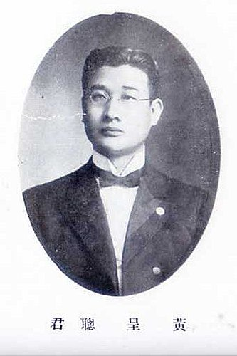 黃呈聰肖像